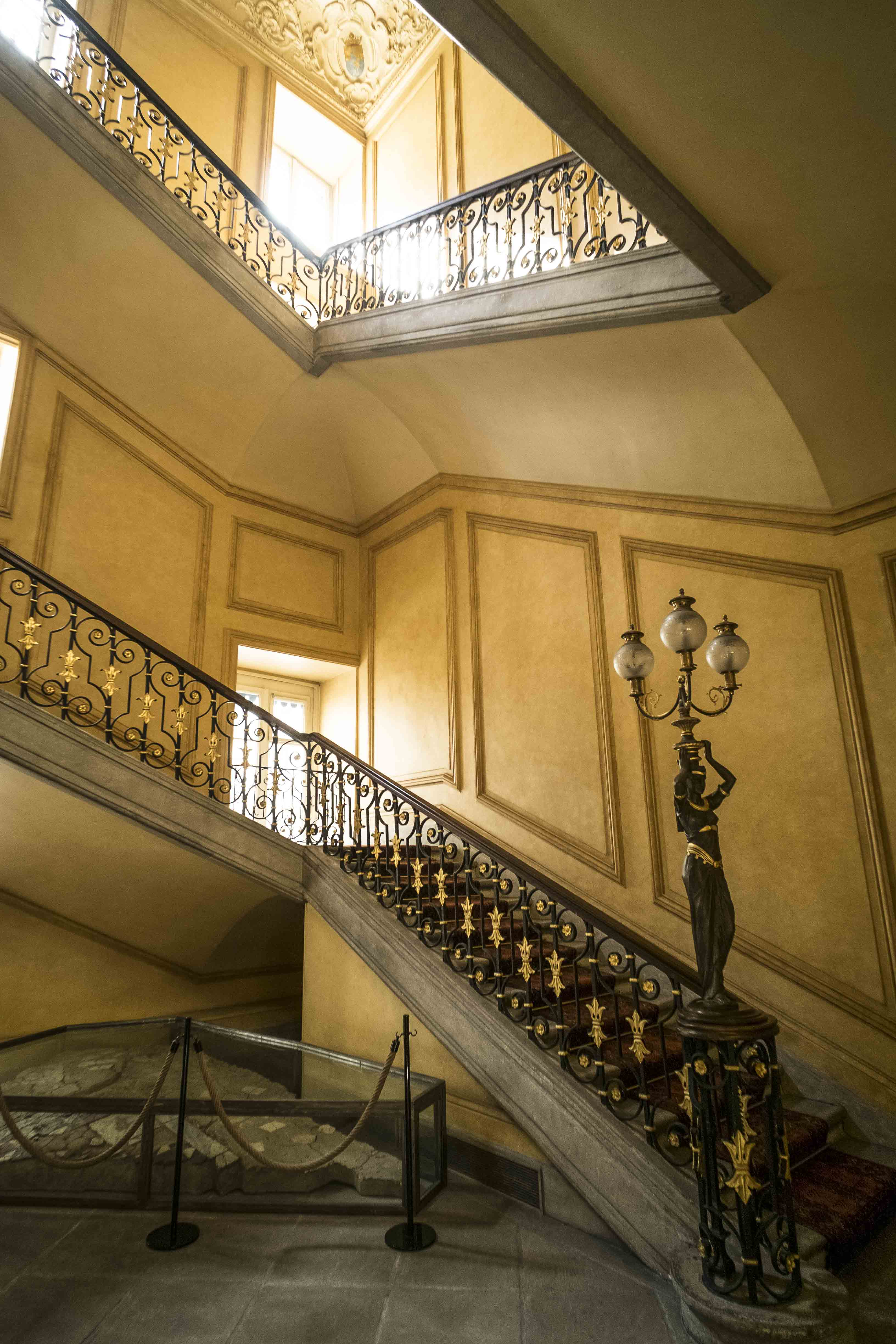 Escalier intérieur de l'hôtel de l'Europe, Lyon 2e